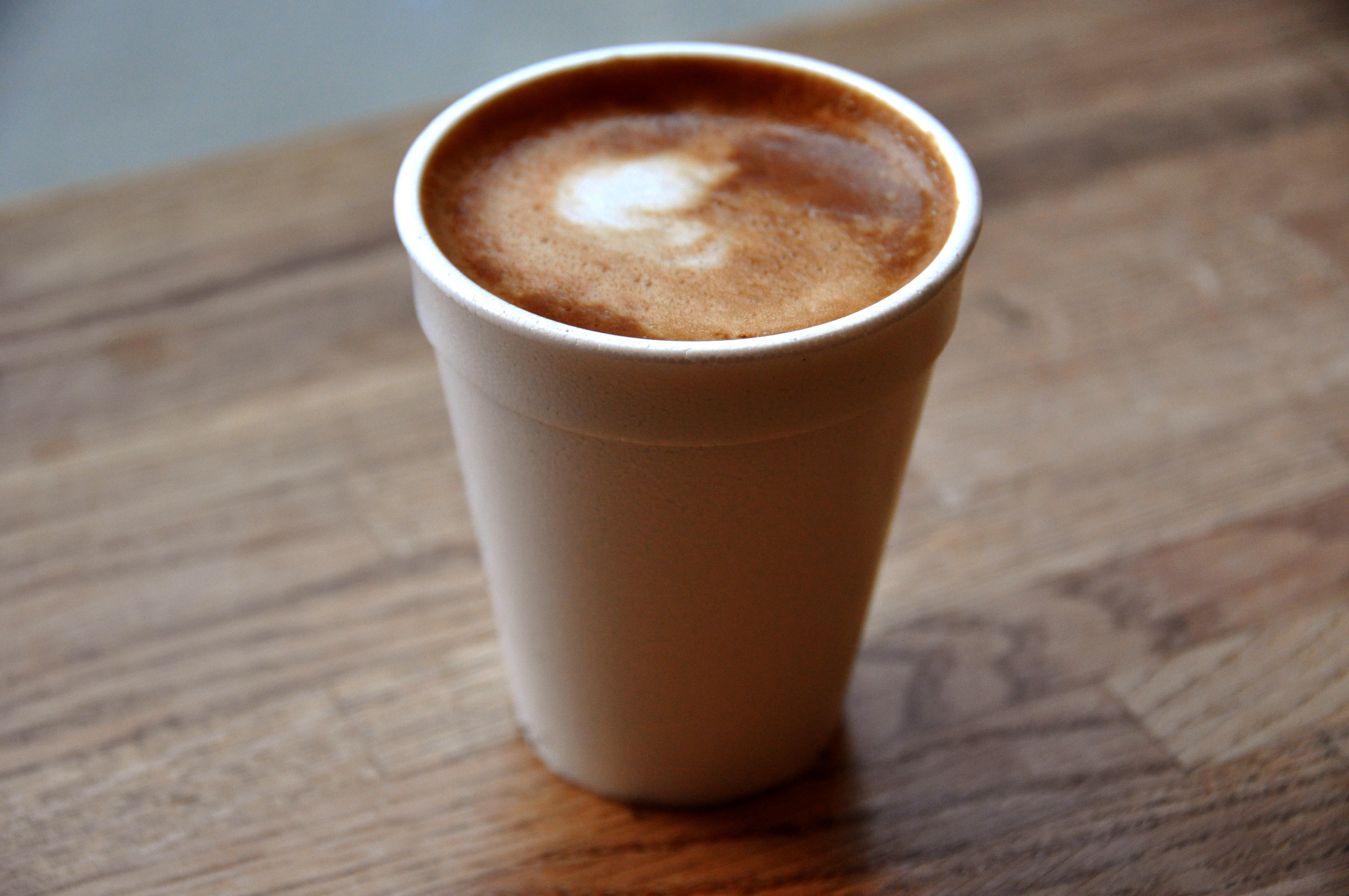 Cortado